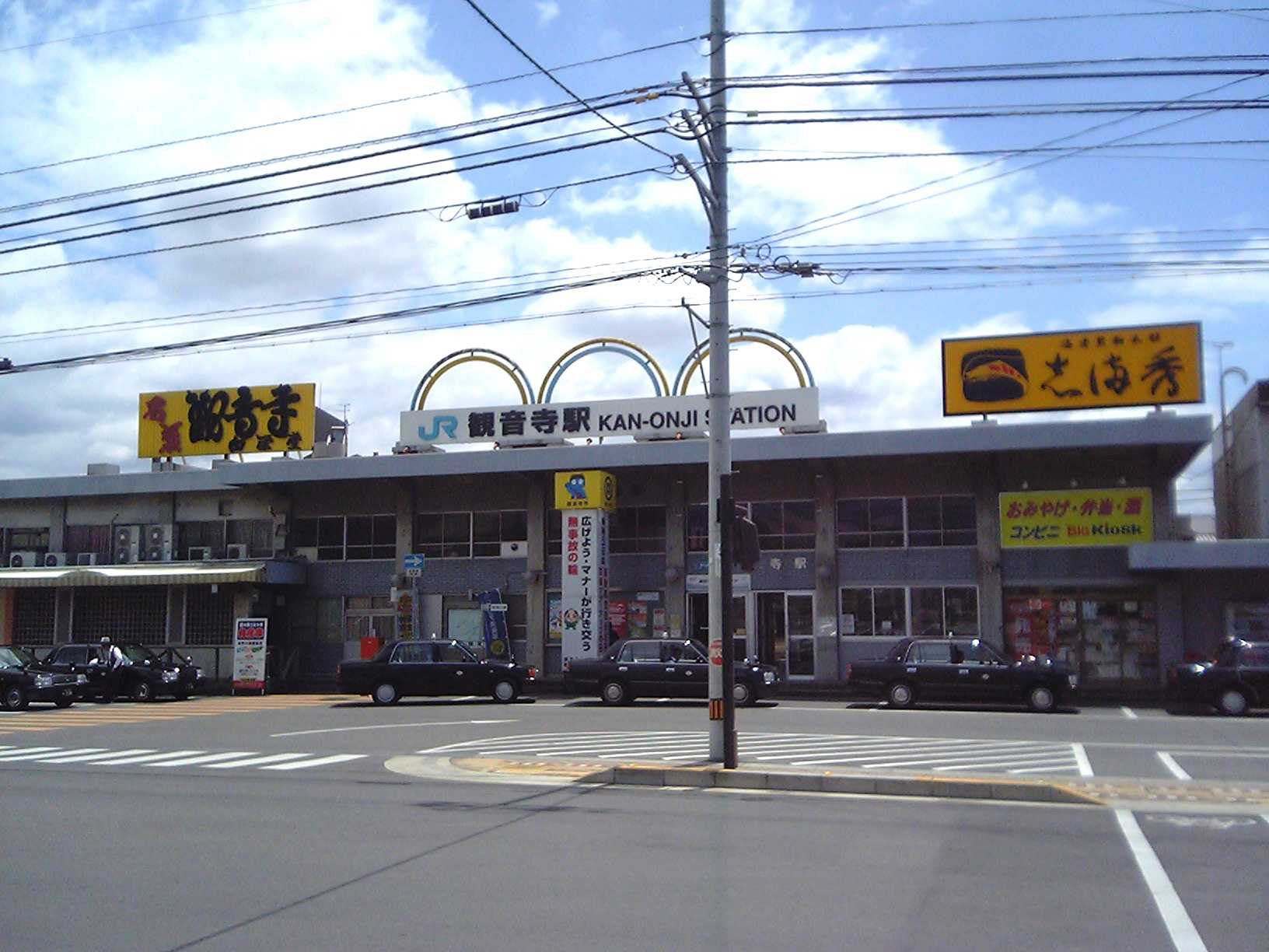 観音寺駅 (香川県)